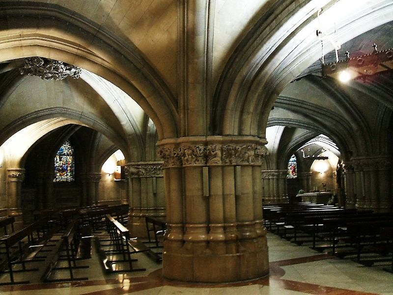 Cripta de la Catedral Nueva de Vitoria